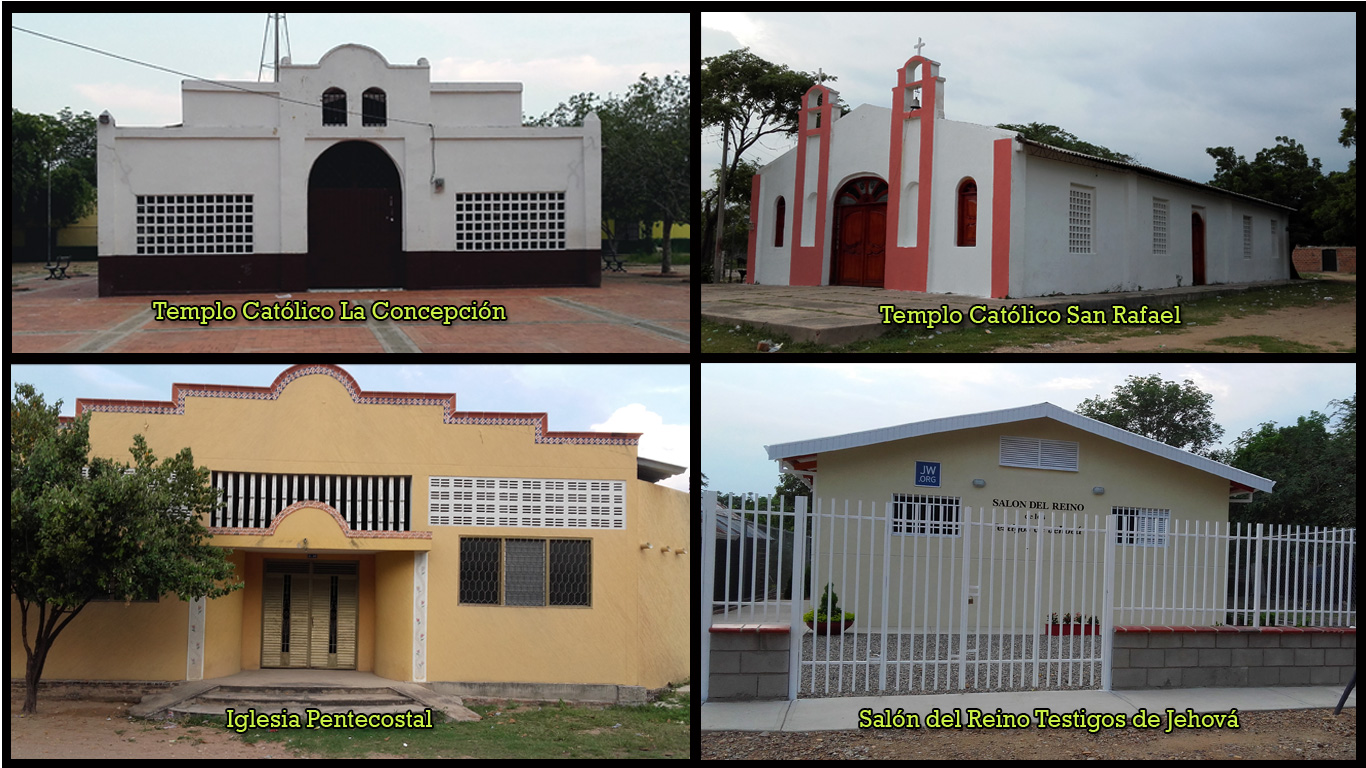 Principales templos religiosos del corregimiento de Aguas Blancas de Valledupar.